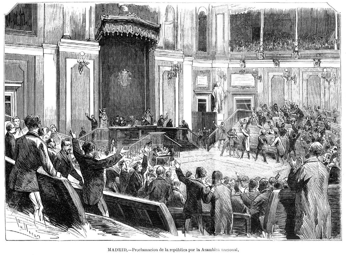 Madrid, proclamación de la república por la Asamblea nacional, en la revista española La Ilustración Española y Americana.